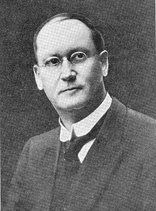 DF Malan in sy jonger jare